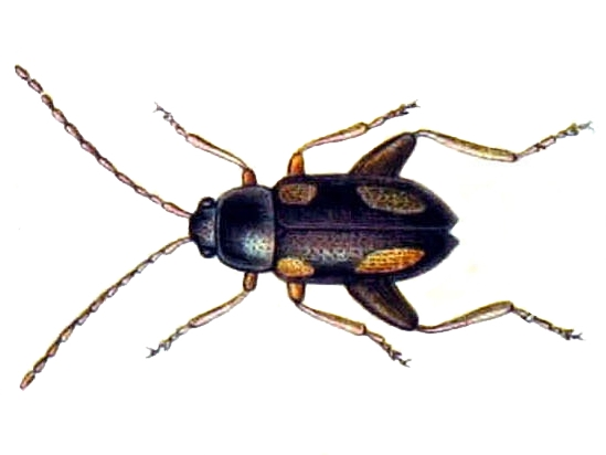 Die Käfer des Deutschen Reiches (FAUNA GERMANICA), IV. Band, Farbendrucktafel Longitarsus quadriguttatus